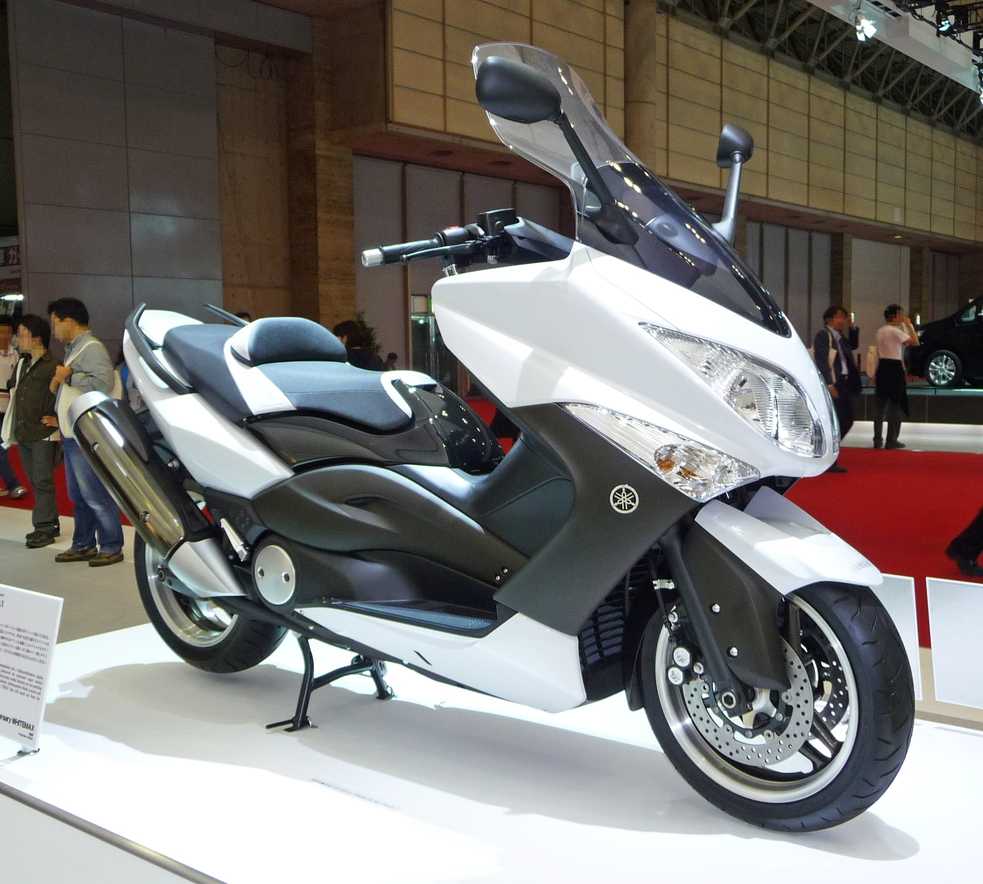 東京モーターショー2009で展示されていたヤマハ・TMAX10周年記念カラー車